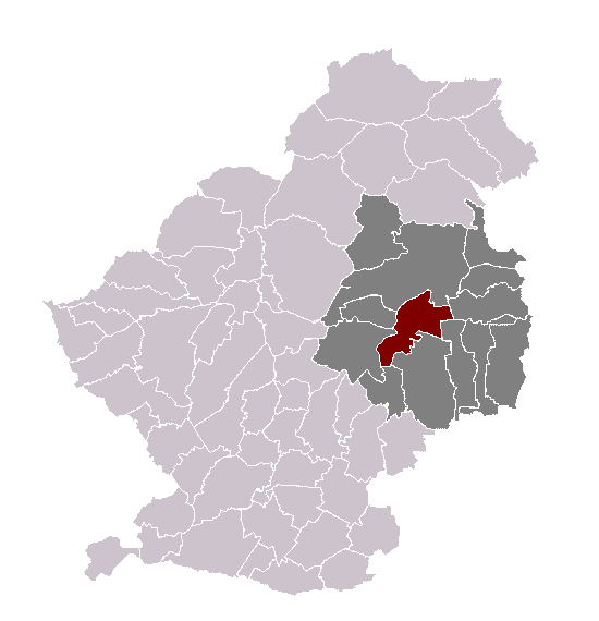 Rieulay dans son canton et son arrondissement